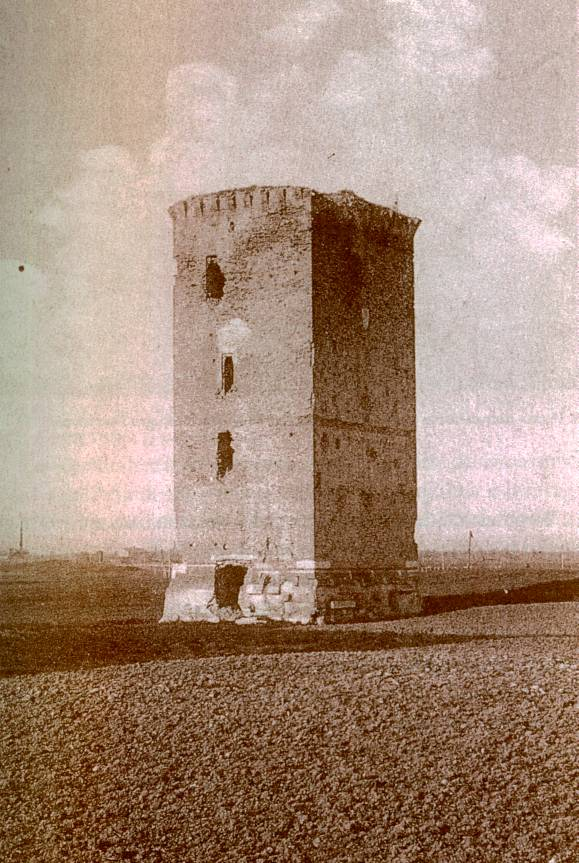 Photographie de 1926 de la tour de guet au nord de Cesenatico.